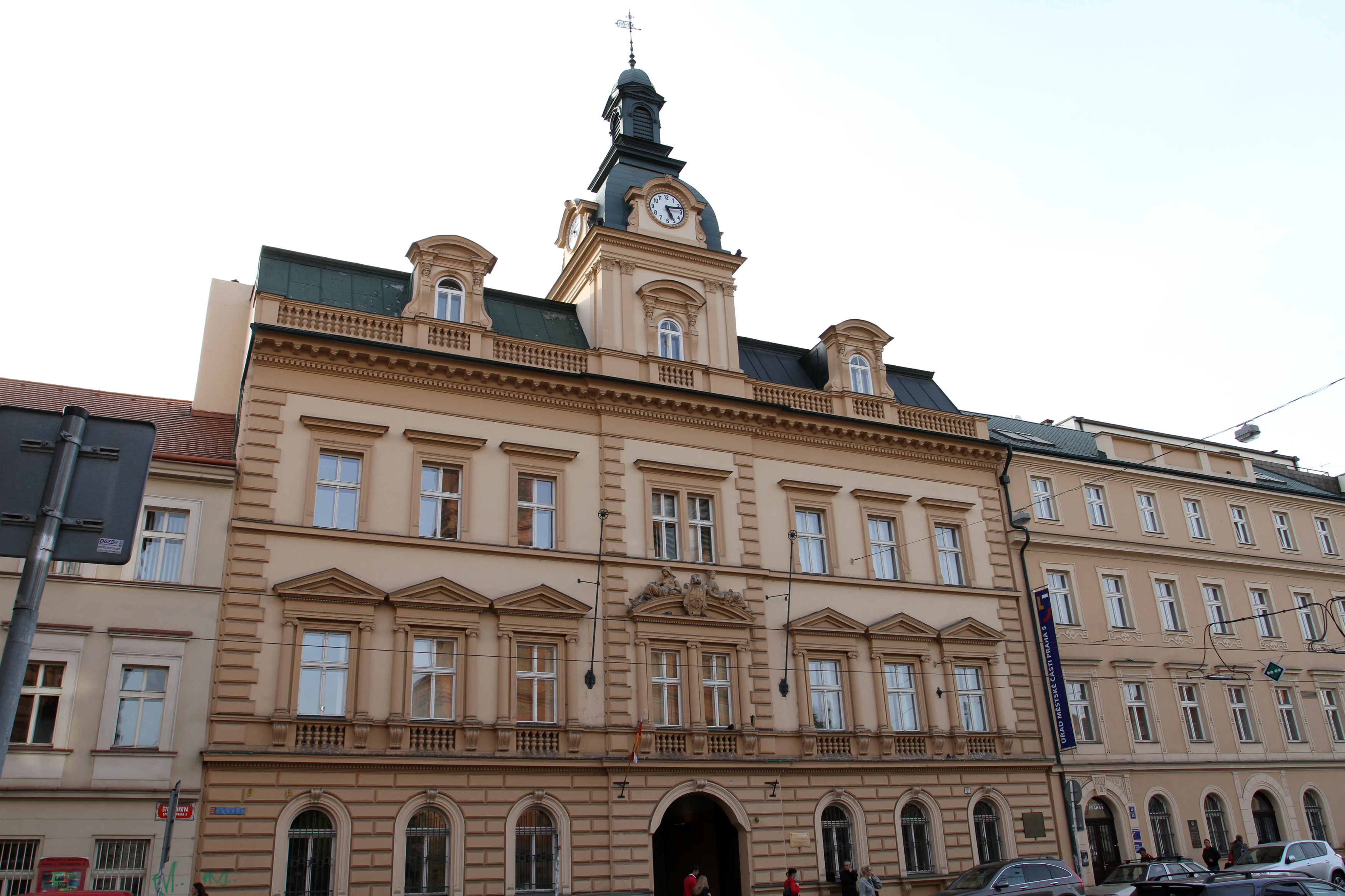 Smíchovská radnice, Praha 5-Smíchov, Štefánikova 236/13